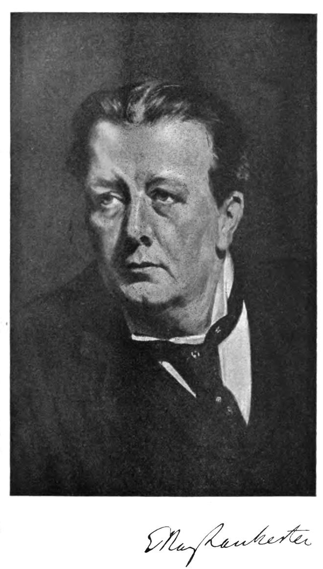 Edwin Ray Lankester